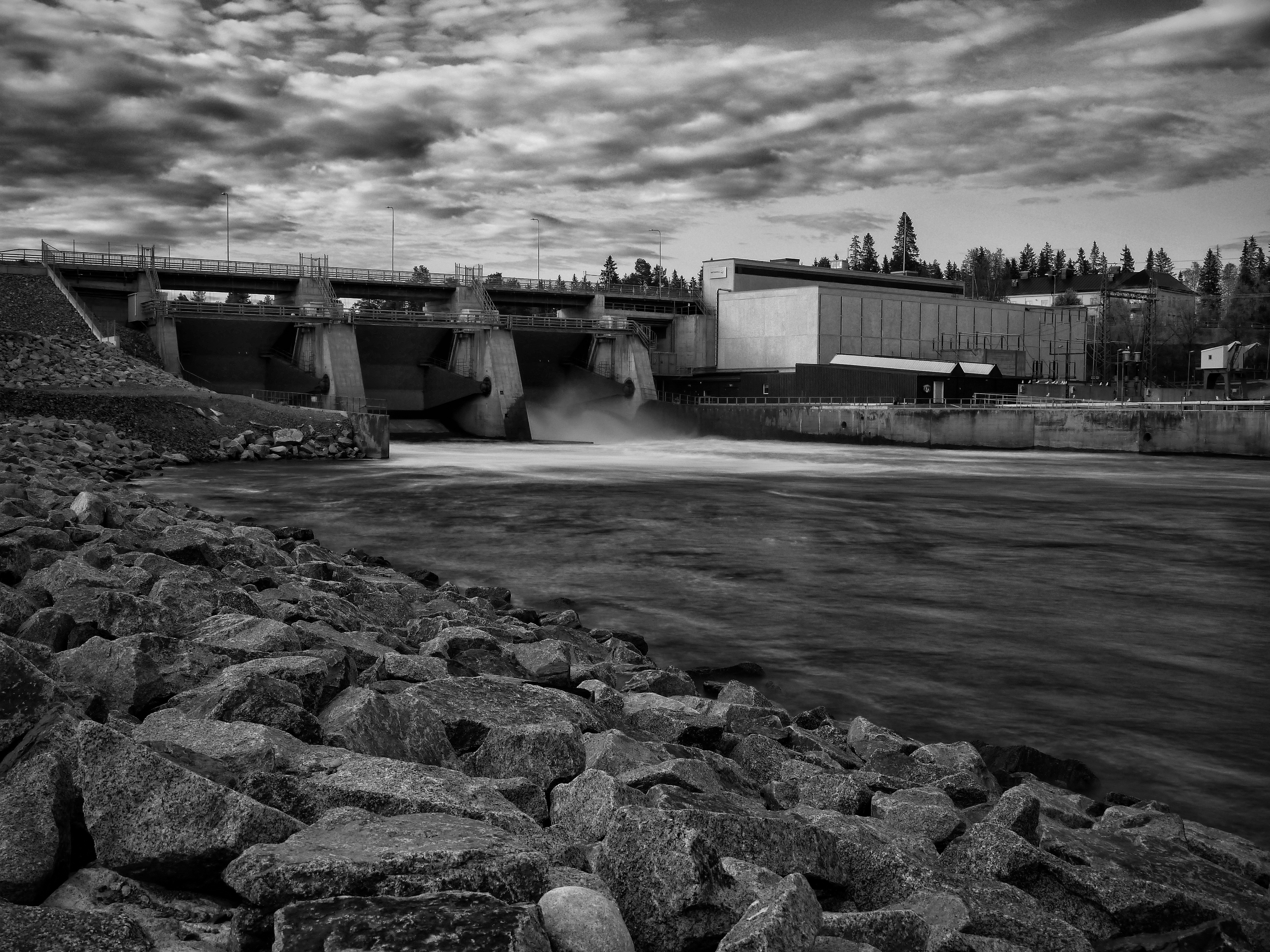 Vattenkraftverket i boden efter luleälven. Foto taget 25 maj 2013.